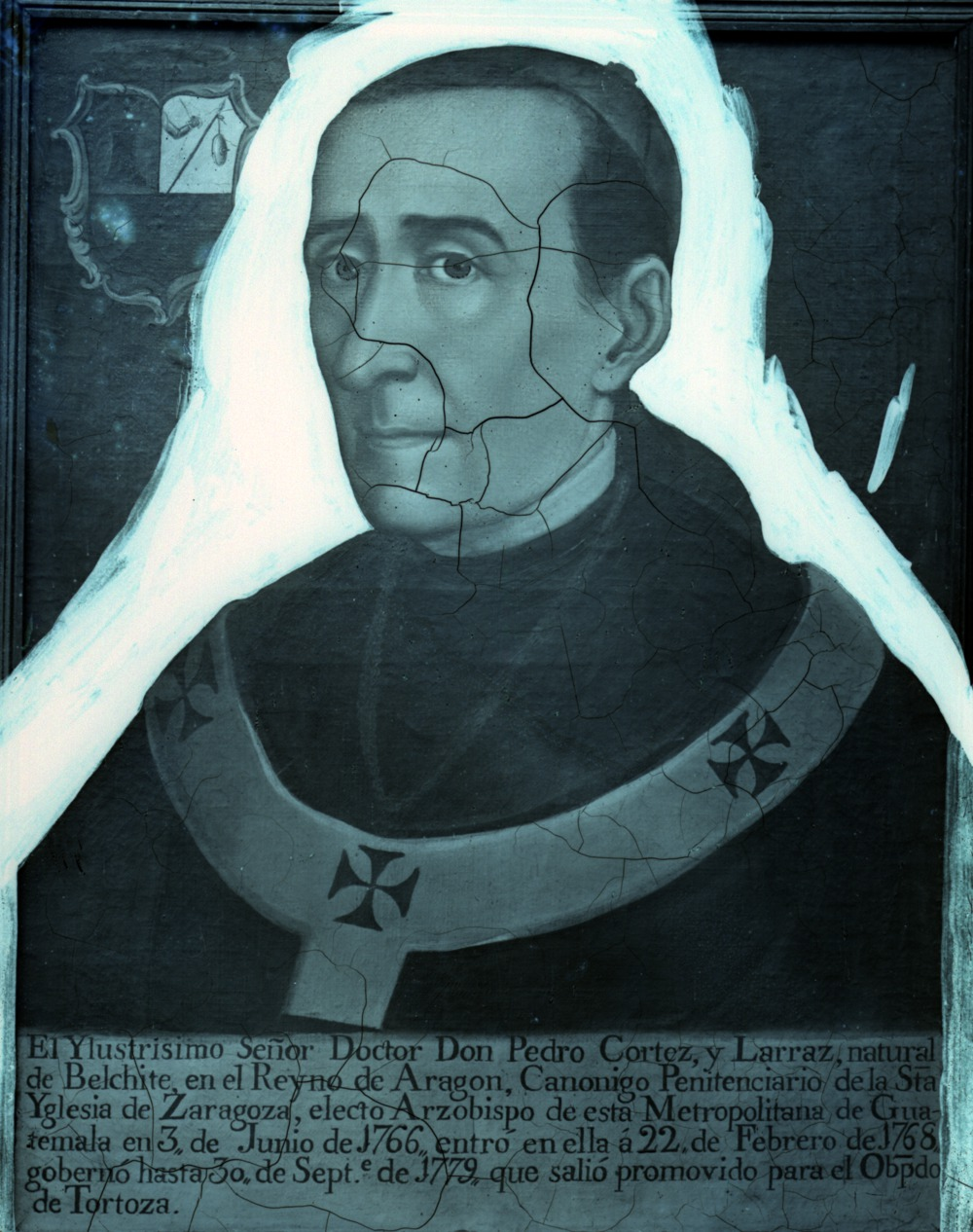 Arzobispo de Guatemala. Pedro Cortés y Larraz